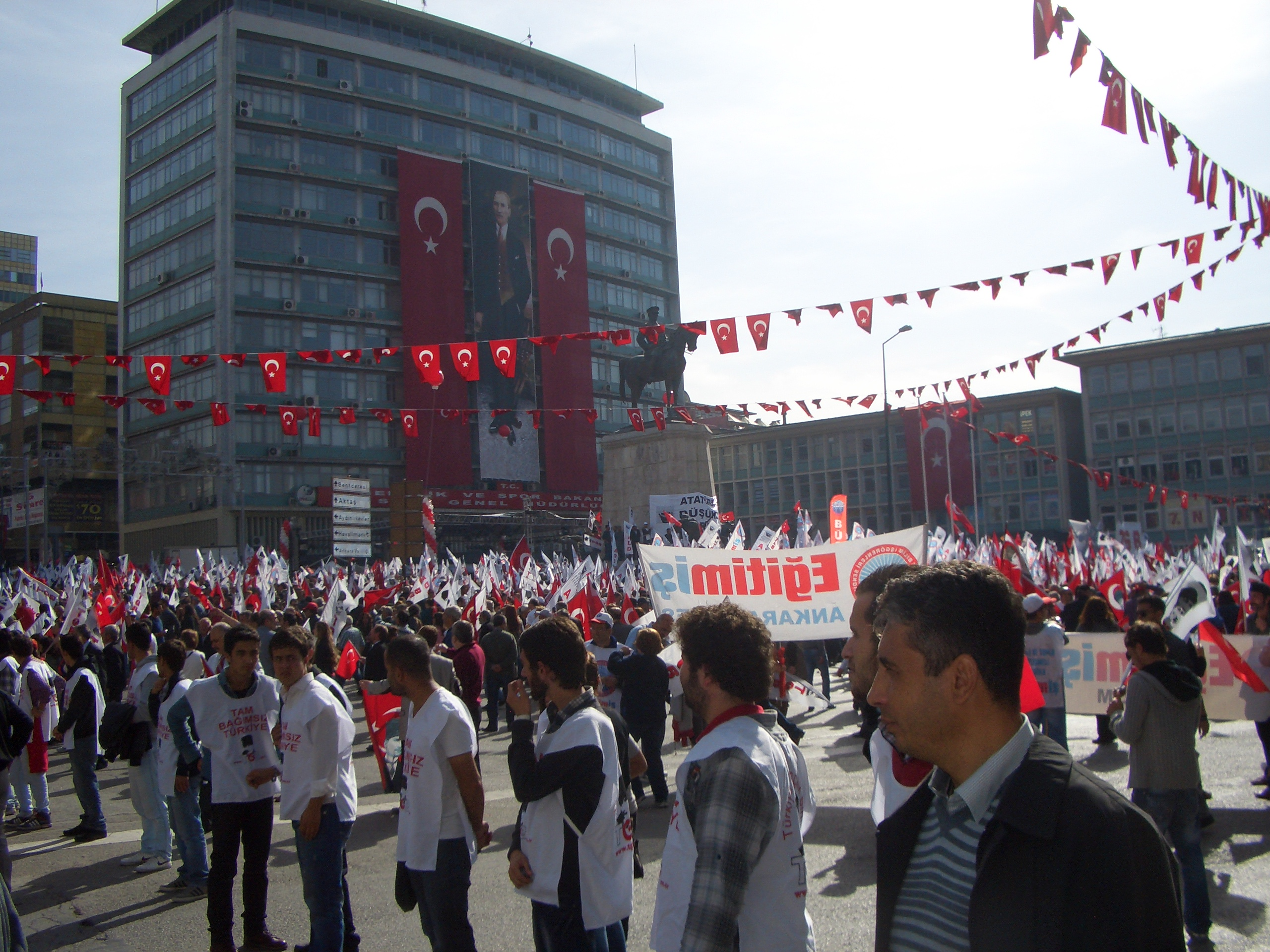 Cumhuriyet için Seferberlik Buluşması